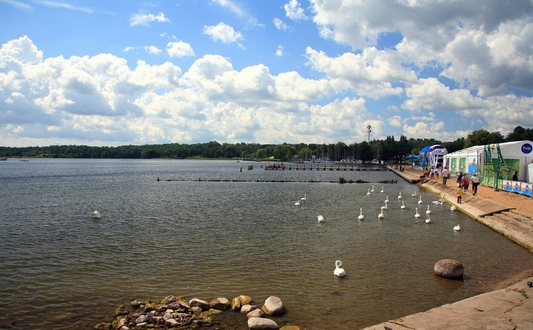 Giżycko - miasto w woj. warmińsko-mazurskim